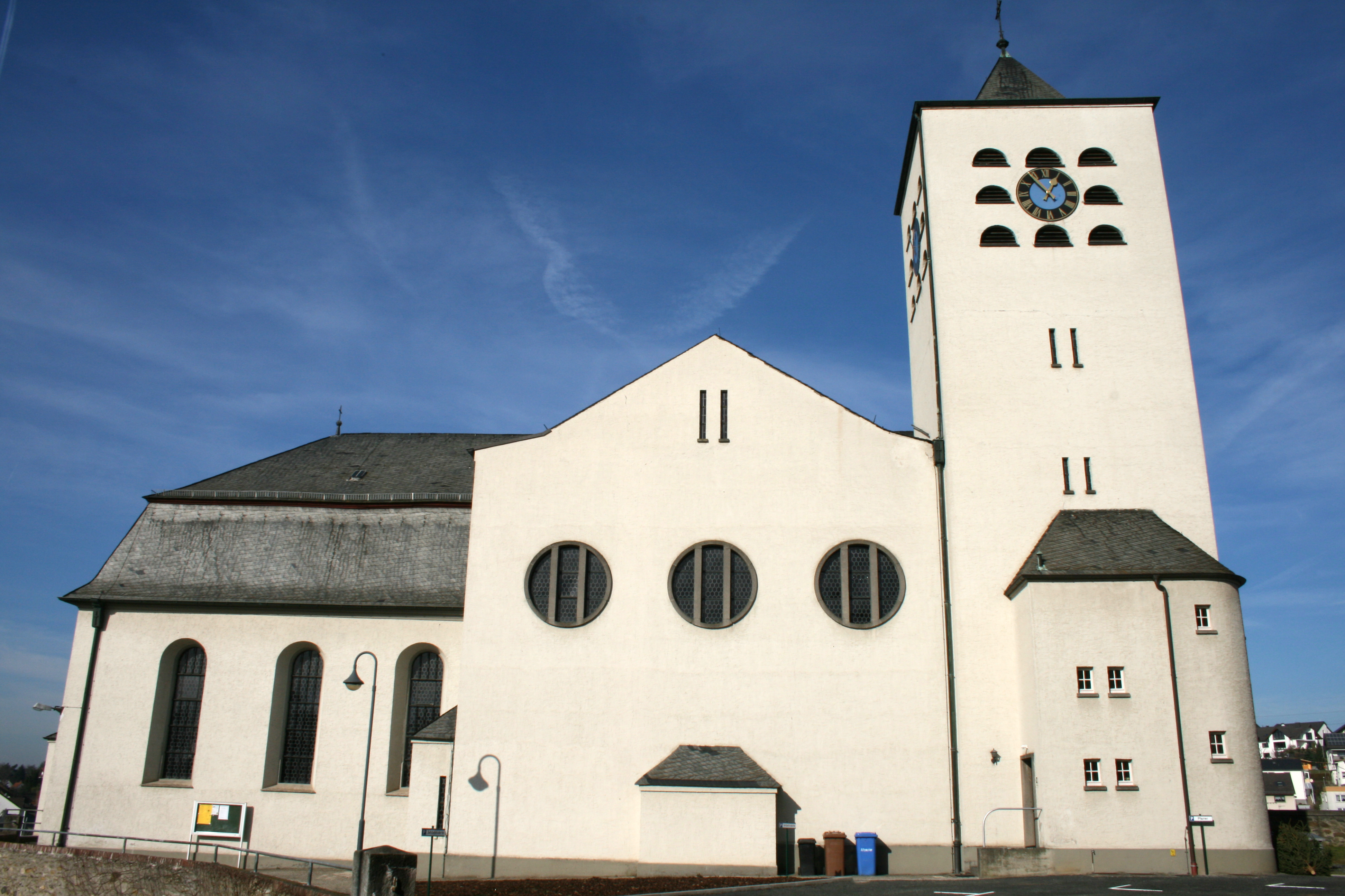 Kirche der sieben Märtyrer, Brechen-Oberbrechen, Deutschland